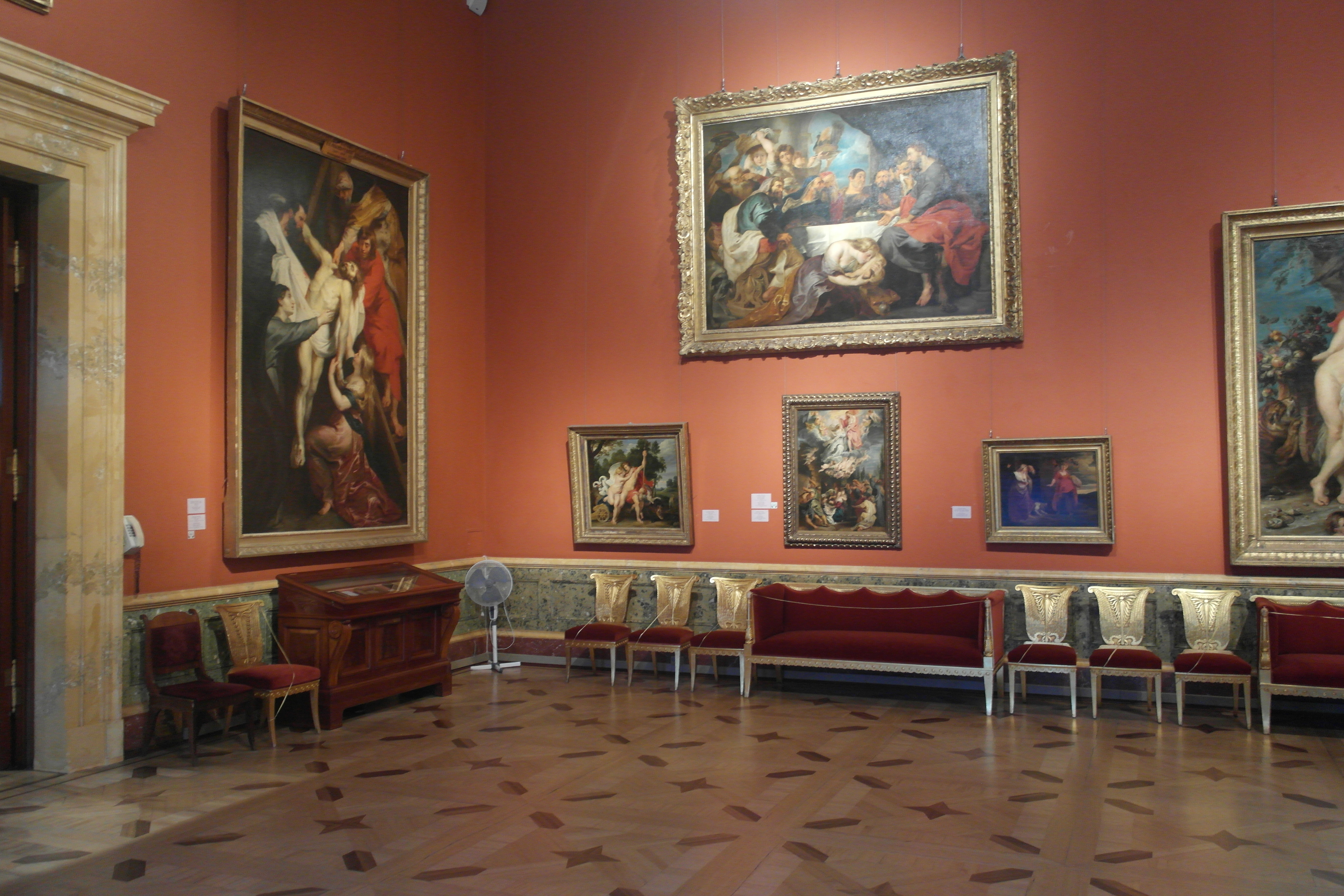 Новый Эрмитаж, зал 247 - Зал Рубенса